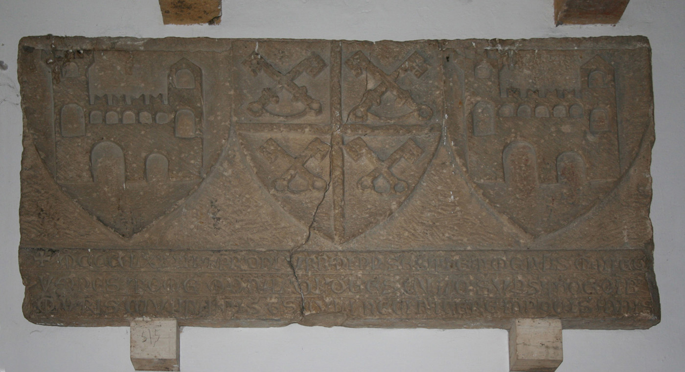 Stemma della città di Ascoli Piceno datato 1382 conservato presso palazzo dell'Arengo.